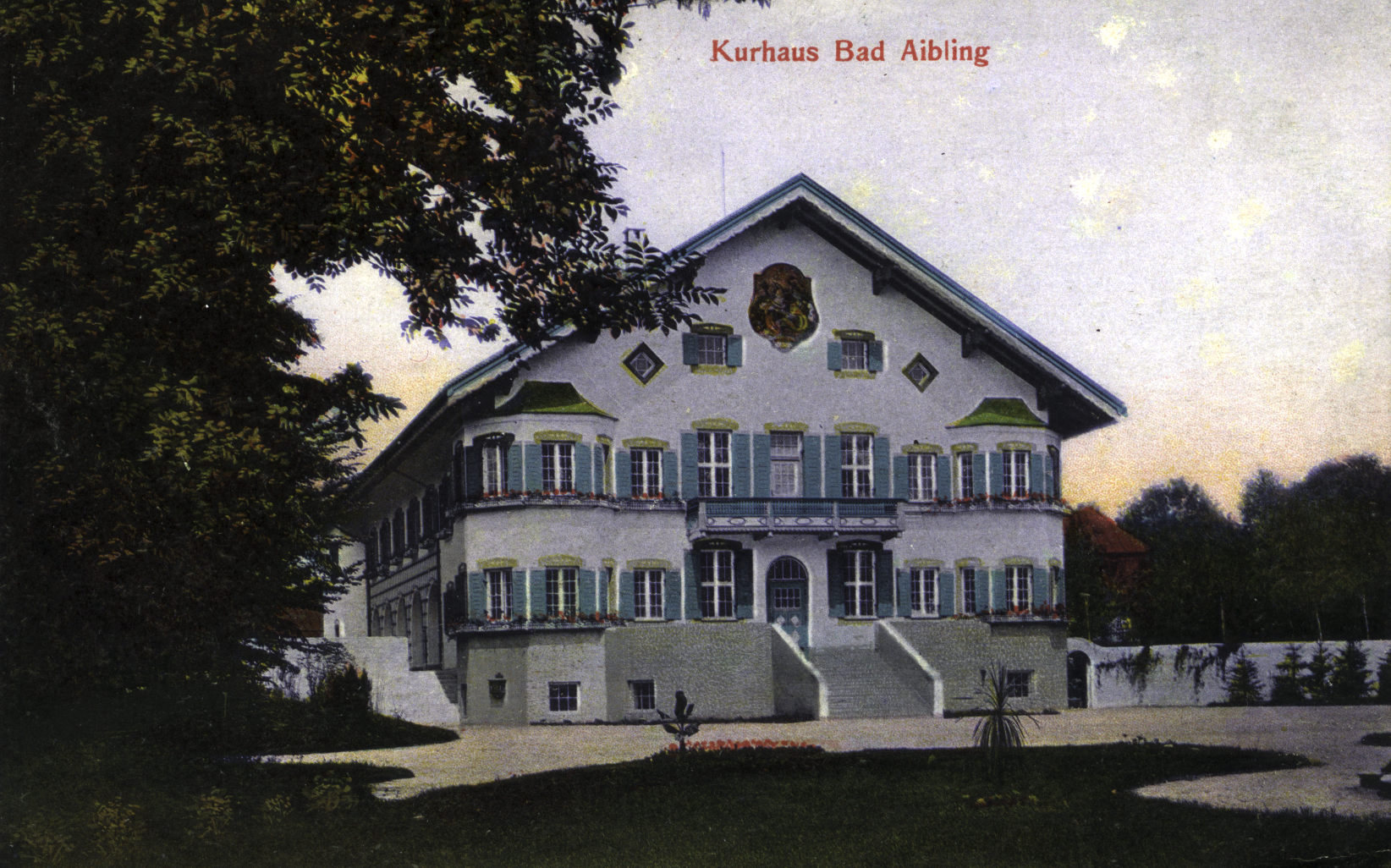 Bad Aibling, Altes Kurhaus, historische Postkarte von 1907